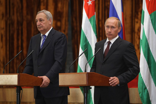 По итогам подписания документов Президент Республики Абхазия С.В.Багапш и Председатель Правительства Российской Федерации В.В.Путин дали пресс-конференцию